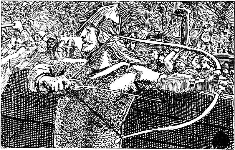 Christian Krohg: Illustration for Olav Tryggvasons saga, Heimskringla 1899-edition. nn: Einar Tambarskjelve: «For veik, for veik er kongens boge!» nb: Einar Tambarskjelve: «For veik, for veik er kongens bue!»